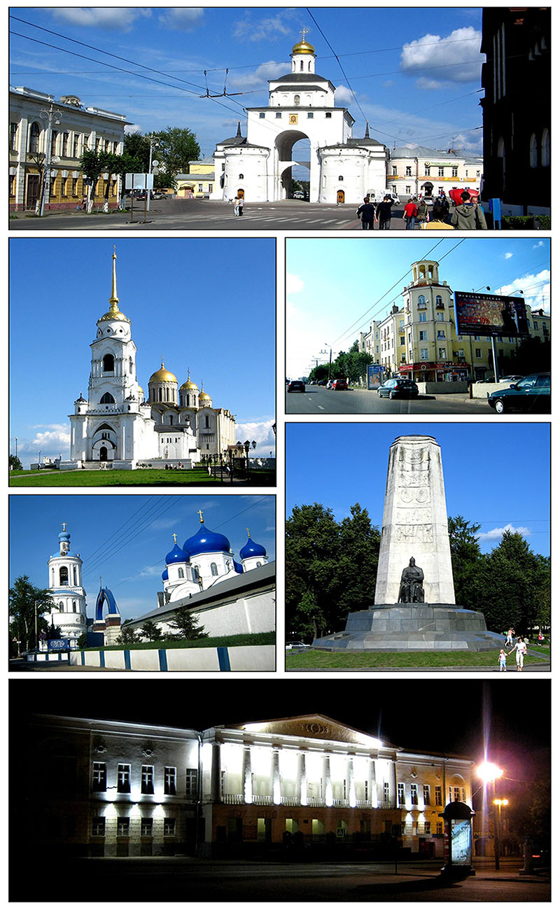 Коллаж из фотографий собственной съёмки.